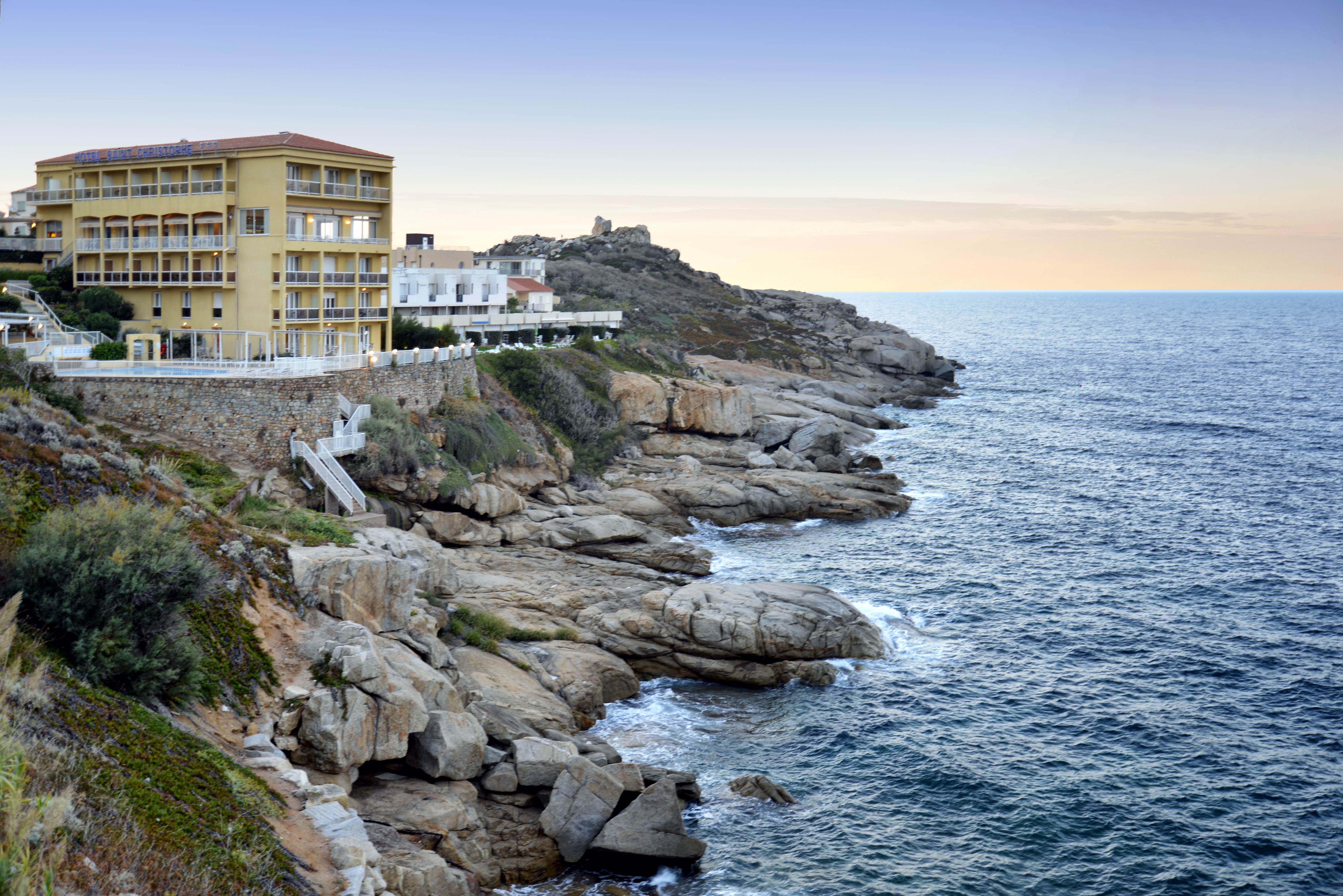 Calvi, Balagne (Haute-Corse) - L'hôtel Saint-Christophe et derrière, l'hôtel Nord-Sud inscrit au titre des Monuments historiques. Le jardin de ce dernier est également repris à l'Inventaire général du patrimoine culturel.